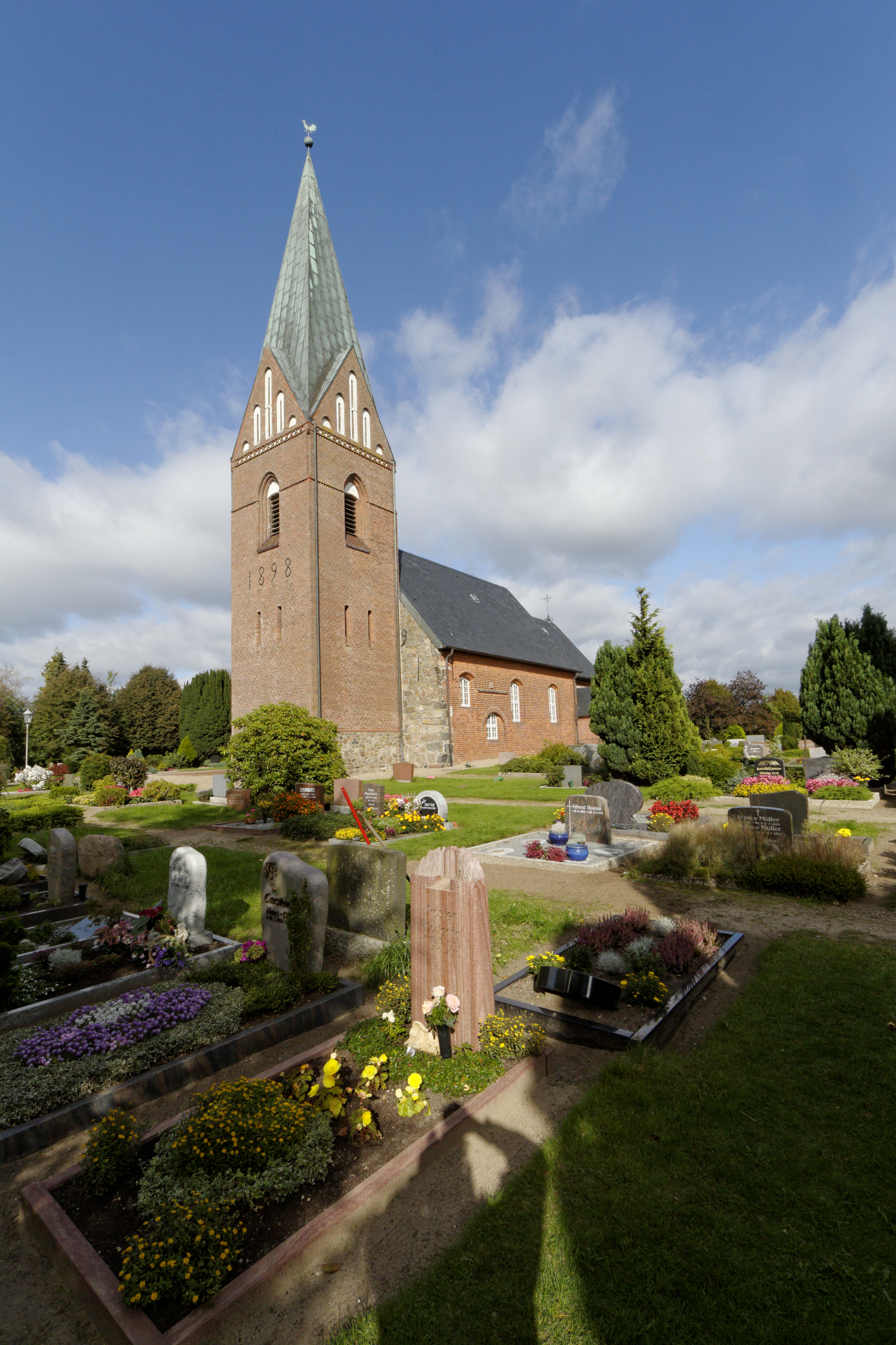 Eggebek, Hauptstr. Kirche St. Petrus